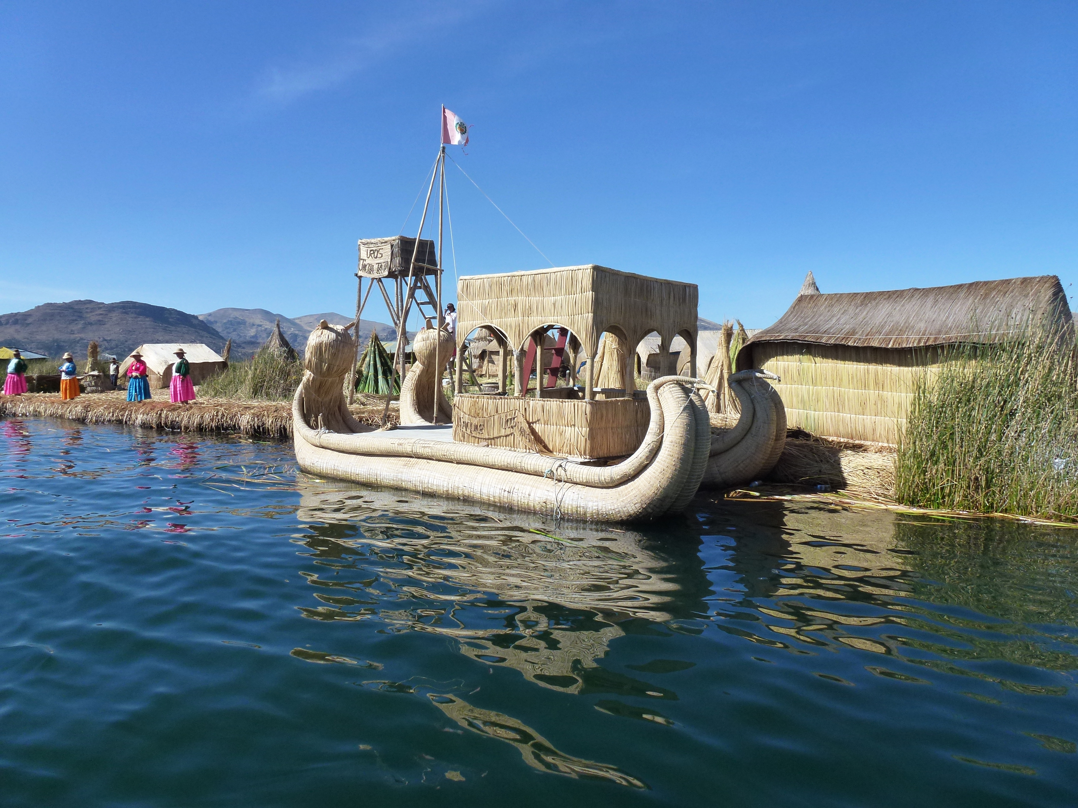 le peuple Aymara (les descendantsUros du Lac Titicaca au Pérou.